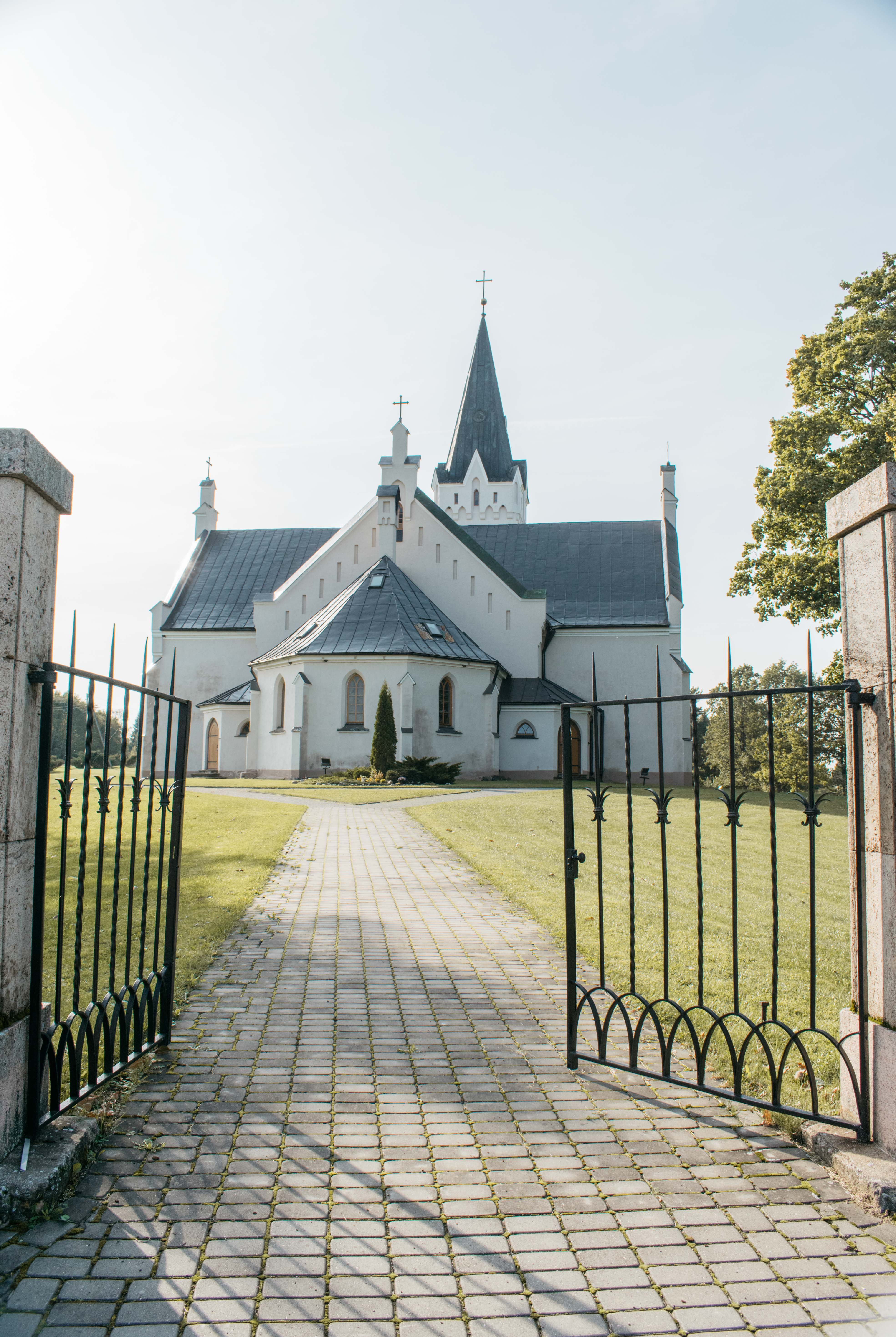 Jaunpiebalgas Svētā Toma evanģēliski luteriskā baznīca, Jaunpiebalga, Gaujas iela 23